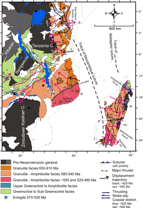 Structural and metamorphic map of the southern EAO. Displacement trajectories are drawn combining successive deformation phases. Dotted lines a,b,c,d,e,e′,f locate cross sections of Fig. 9. AB: Alto Benfica Group; AC: Antogil Craton; AN: Antananarivo Block; ANS: Arabian–Nubian Shield; ASZ: Angavo Shear Zone; I: Itremo Group; IK: Ikalamavony Domain; ISZ: Itremo Shear Zone; MB: Mecubúri Group; MC: Masora Craton; T: Tsaratanana Sheet.